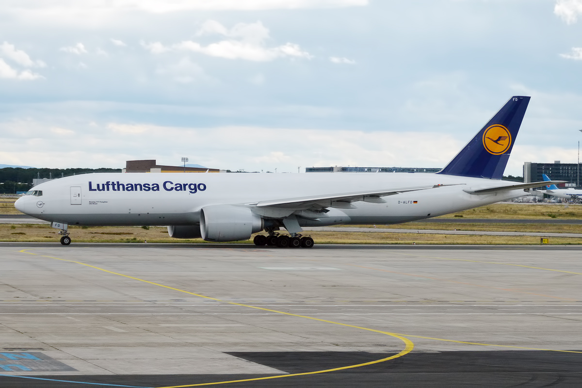 Lufthansa Cargo, D-ALFD, Boeing 777-FBT